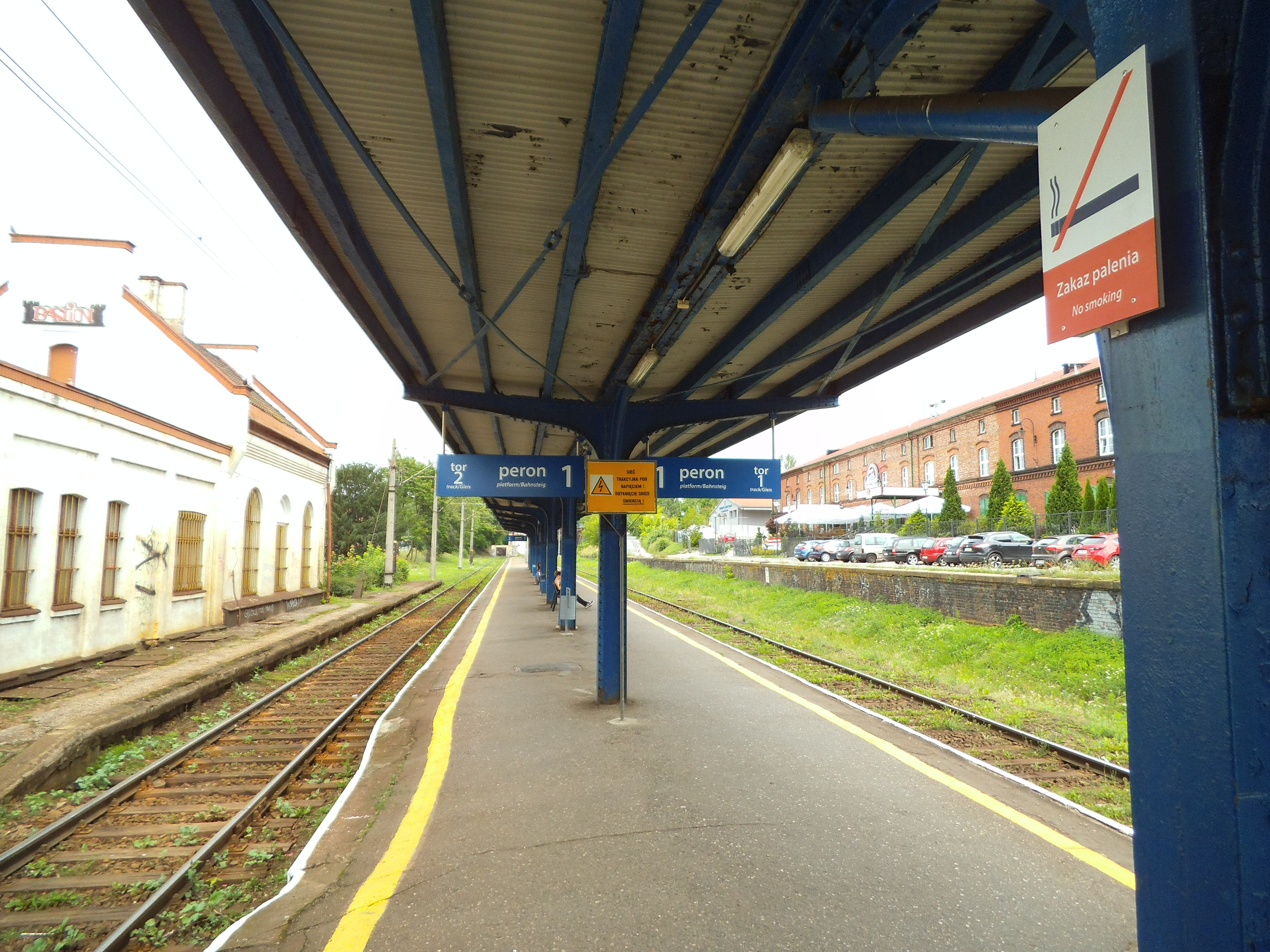 Toruń Miasto29